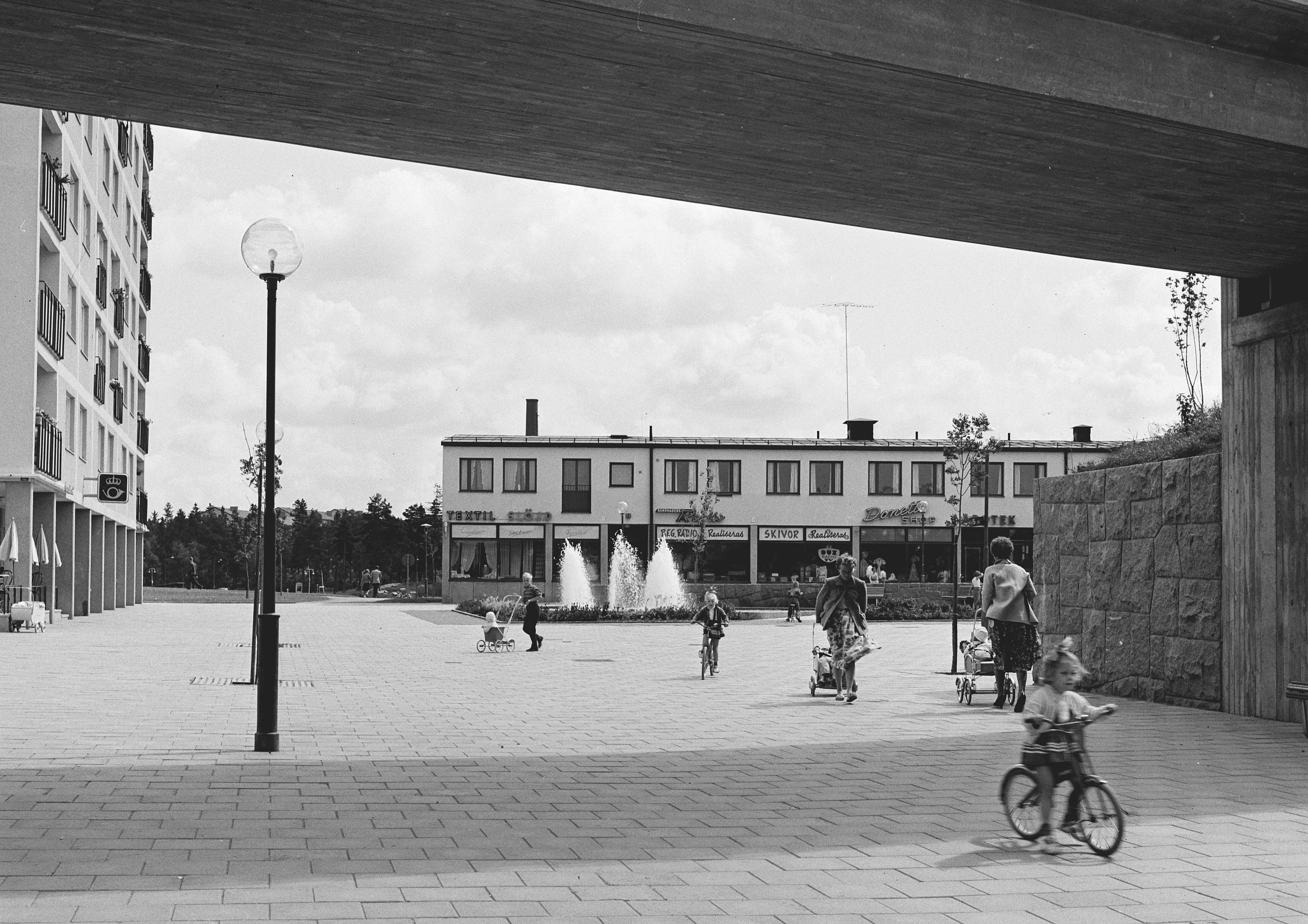 Bandhagens centrum torget, med höghuset till vänster, sedd österut från tunnelbanebron